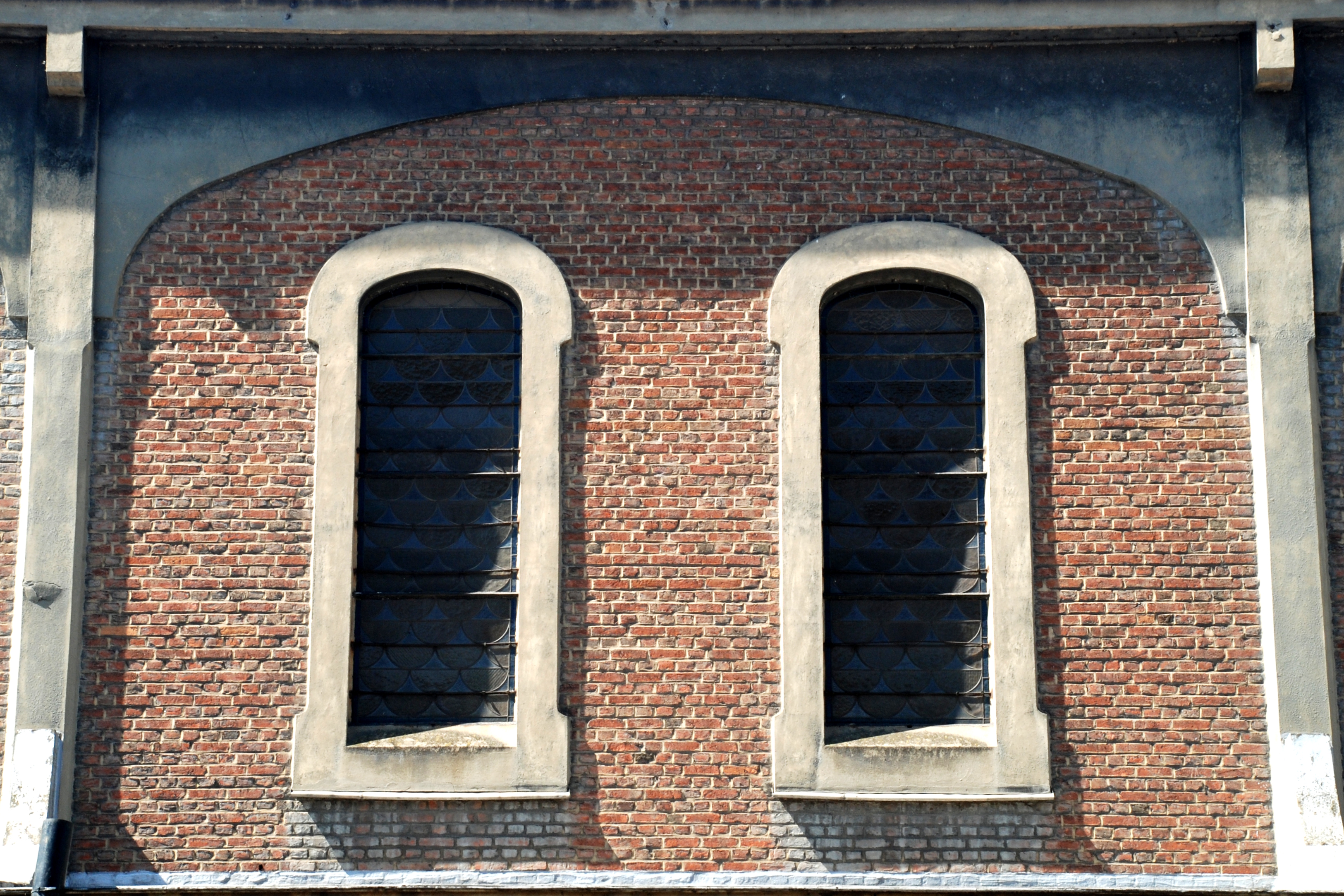 Belgique - Brabant wallon - Rixensart - Genval - Église Saint-Pierre de Maubroux